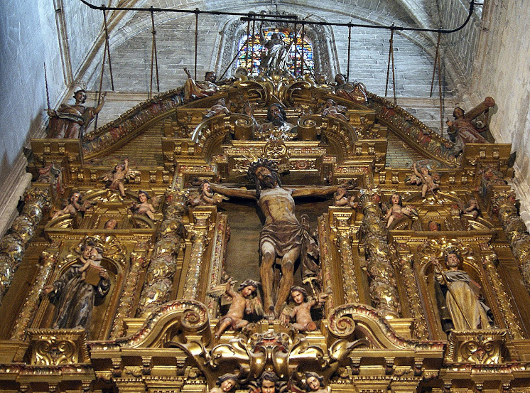 Ático o remate del retablo de la capilla de la Concepción Grande de la catedral de Sevilla, (España). En el centro del ático está el Cristo de San Pablo, que es una talla del siglo XVI que perteneció posiblemente al antiguo retablo de la capilla y que probablemente fue recuperada para colocarla en su situación actual. Esta imagen gozó antiguamente de gran devoción en la ciudad de Sevilla.